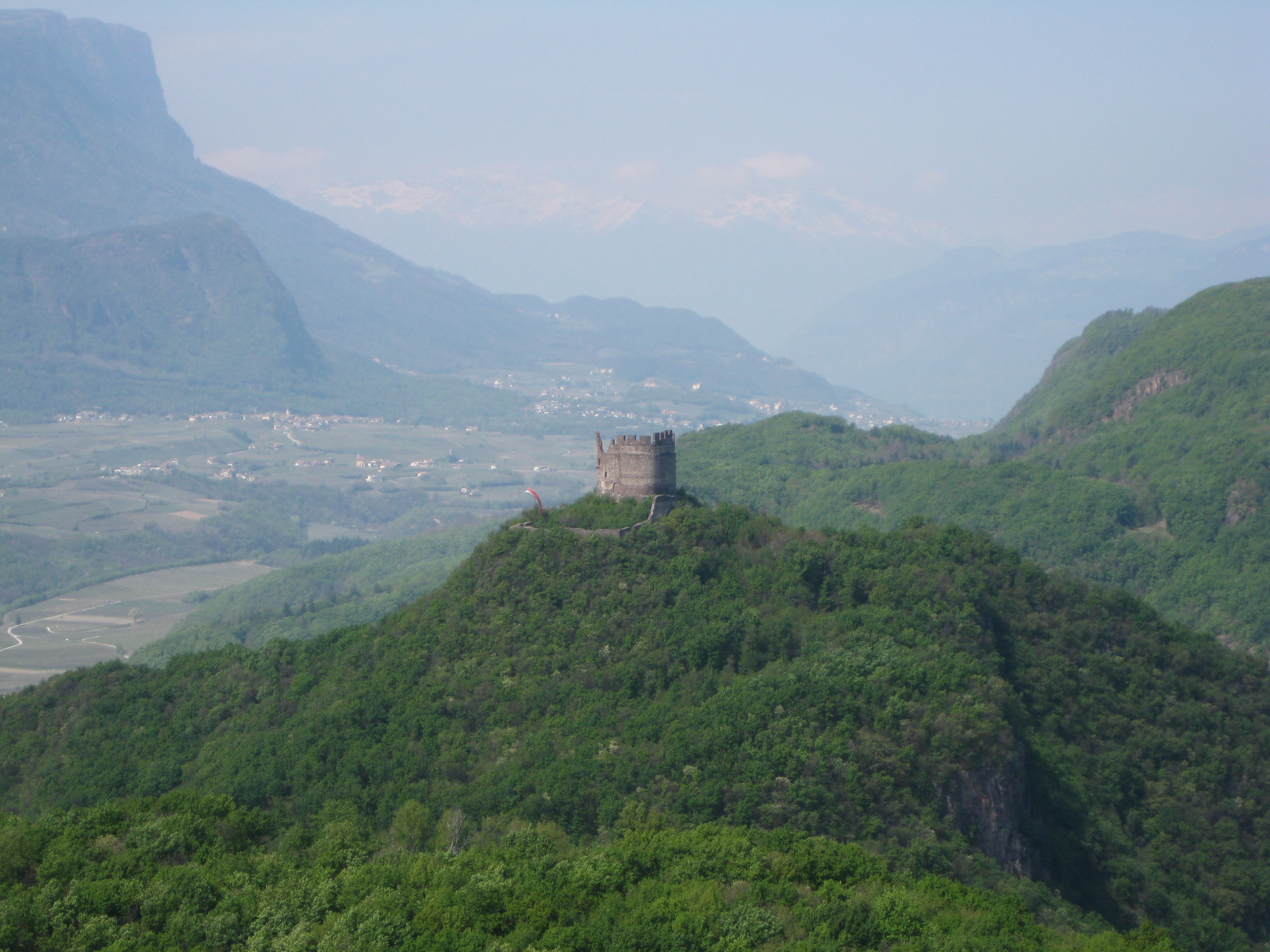 Leuchtenburg von den Rosszähnen aus gesehen